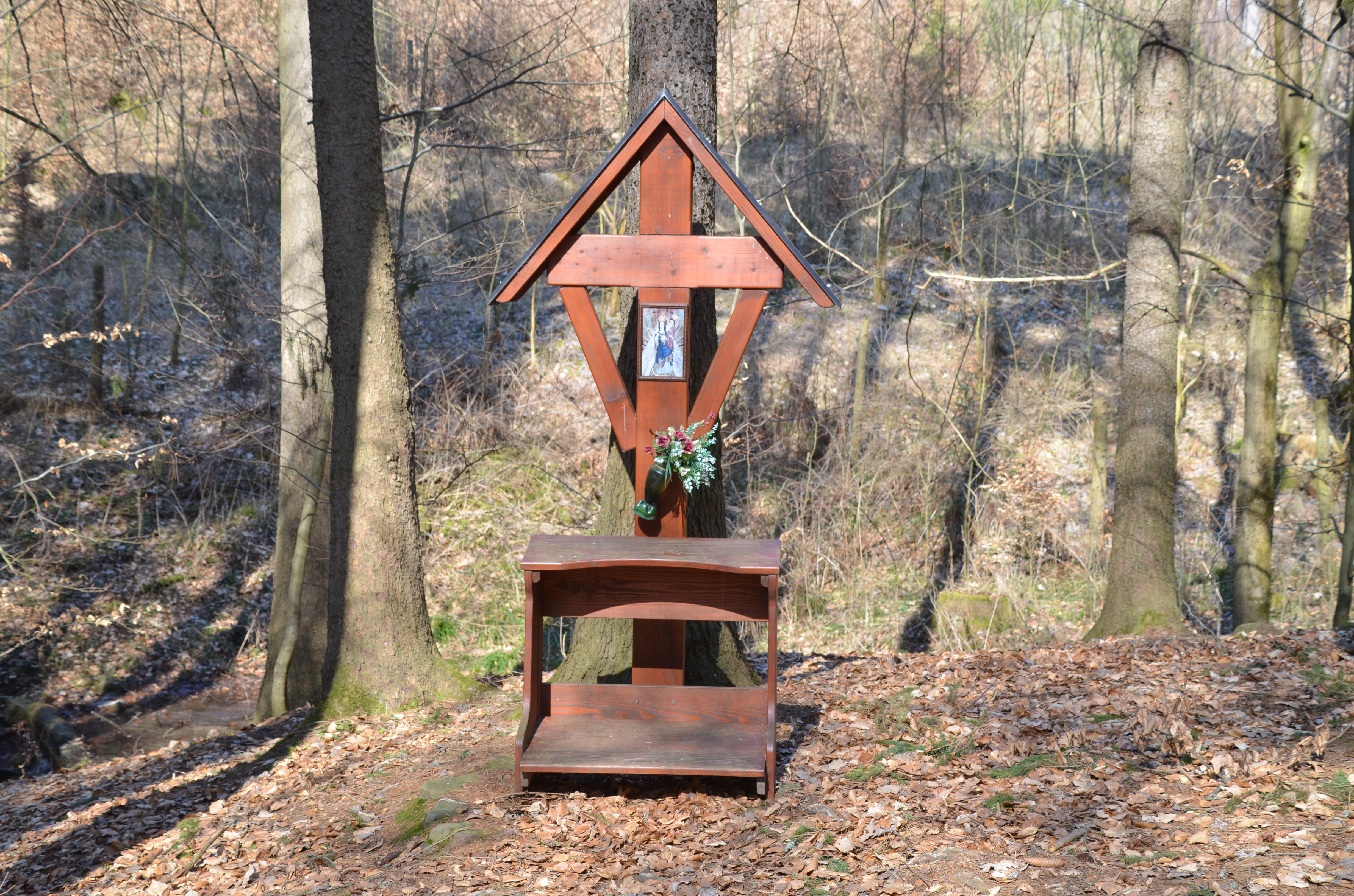 Dřevěné klekátko před dřevěným křížem, které postavila u Křtin na počátku 20. století poslední křtinská šlechtična Adelína Offermannová.